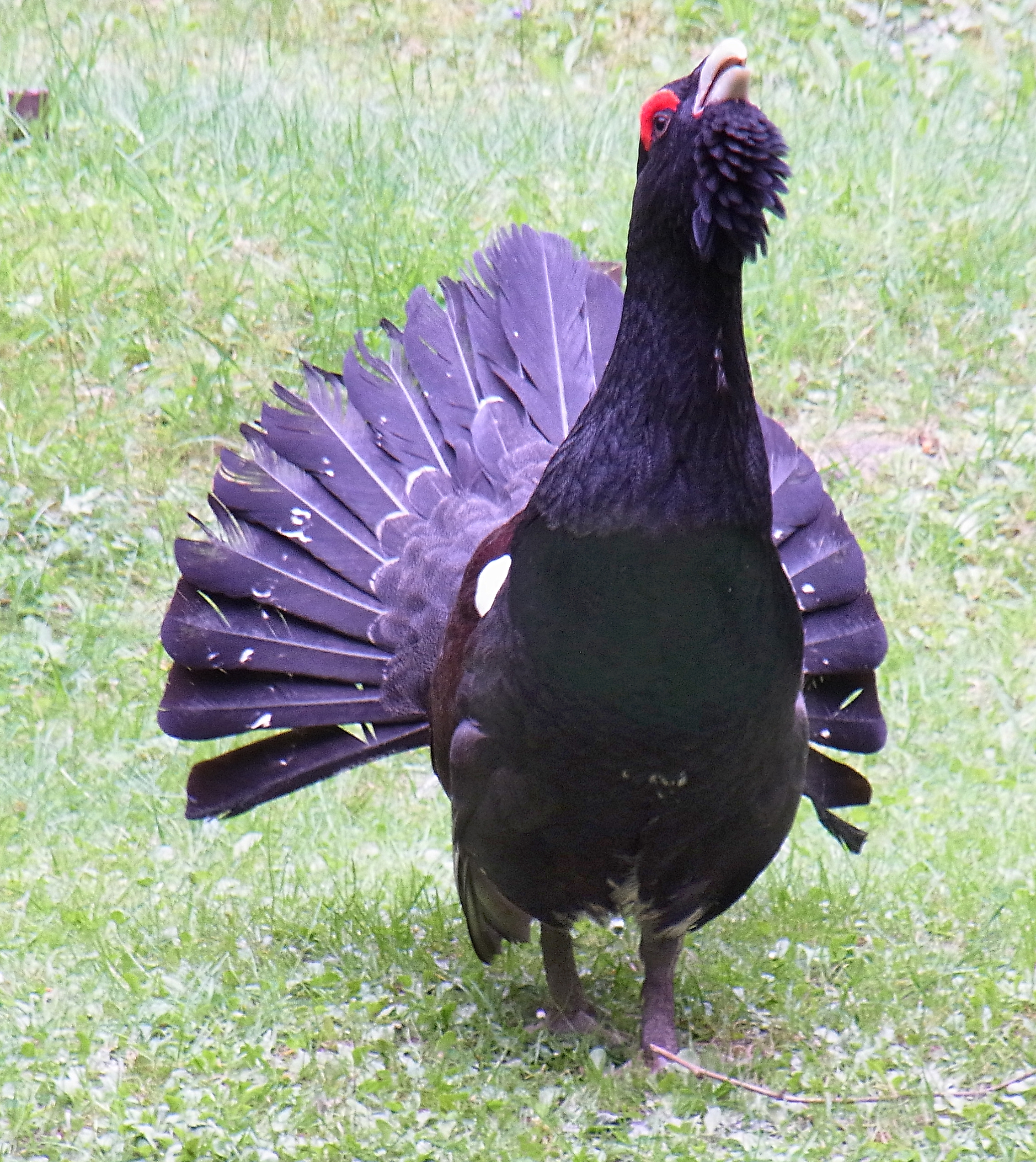 Tetrao urogallus balzender Hahn in Gehege Nationalpark Bayrischer Wald am 17.5.2015